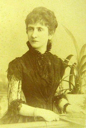 Silvia Pisacane (1853-1888).figlia di Carlo Pisacane